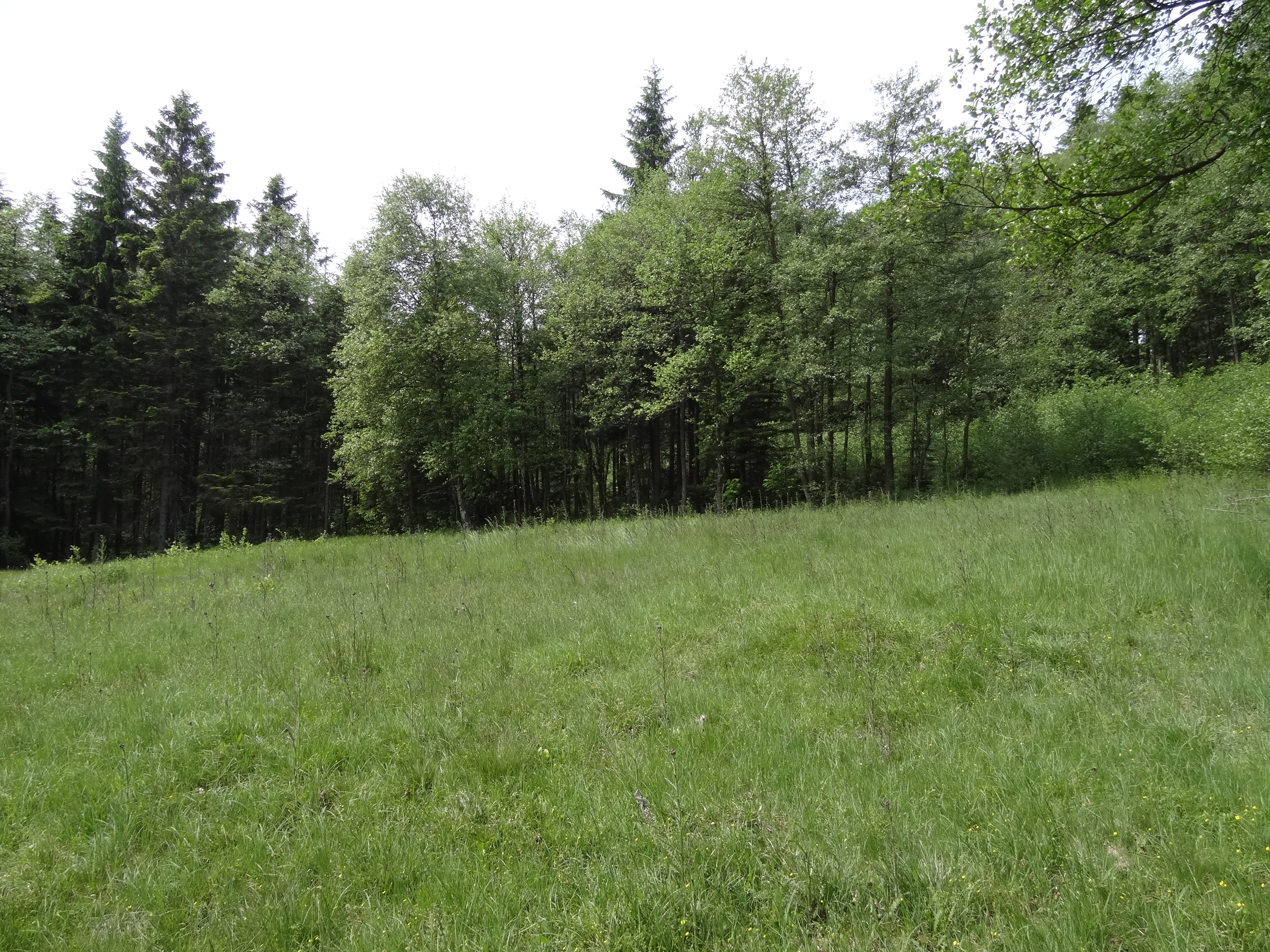 PP Rašeliniště pod Předním vrchem chrání bezlesou rašelinnou enklávu v souvislém lesním porostu s volnými jezírky a výskytem vzácných druhů rostlin (rosnatka okrouhlolistá, suchopýr úzkolistý, pochvatý, prstnatec májový aj.).